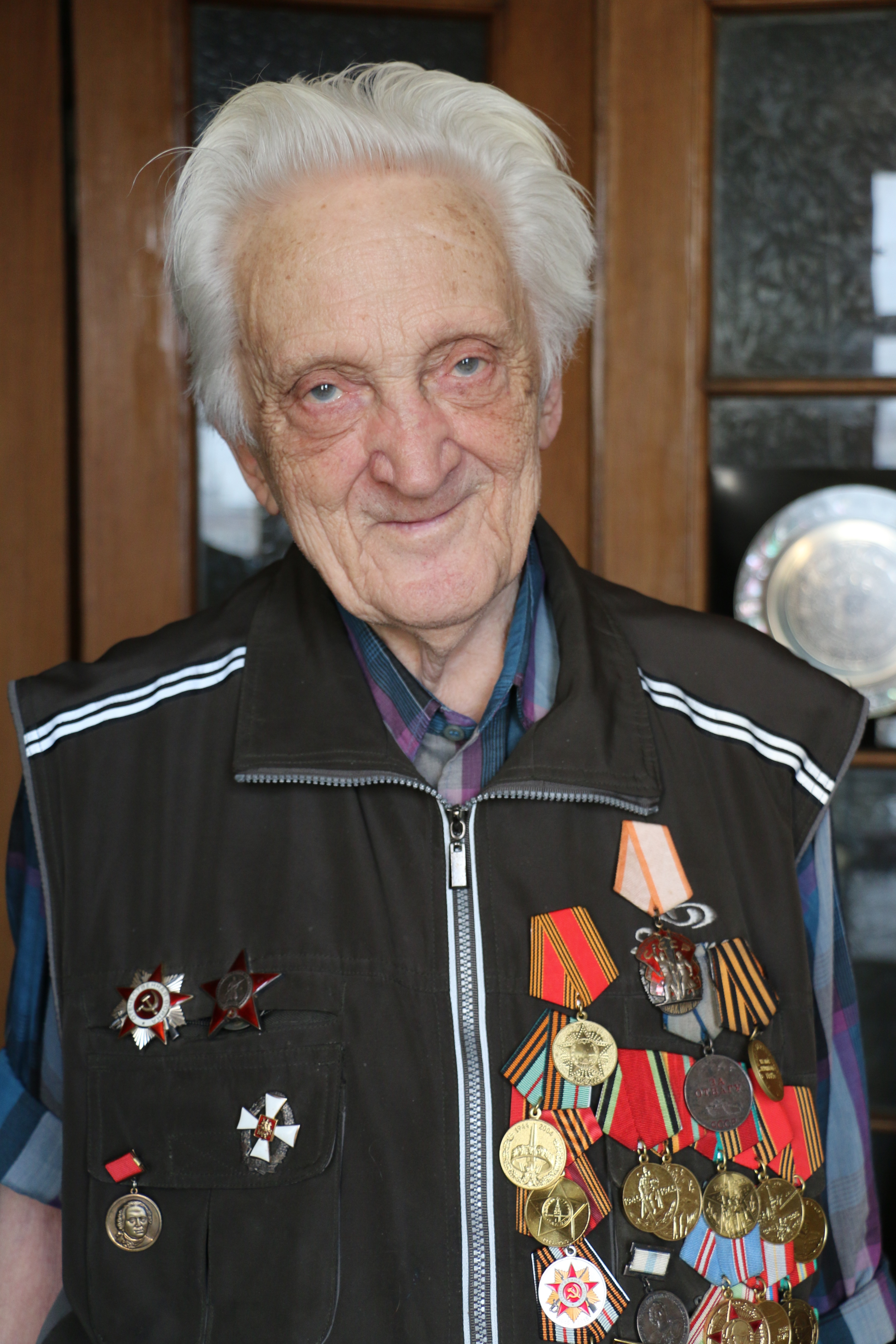 У себя дома, март 2017 г.